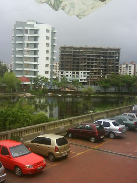 An under construction residential complex in mira road